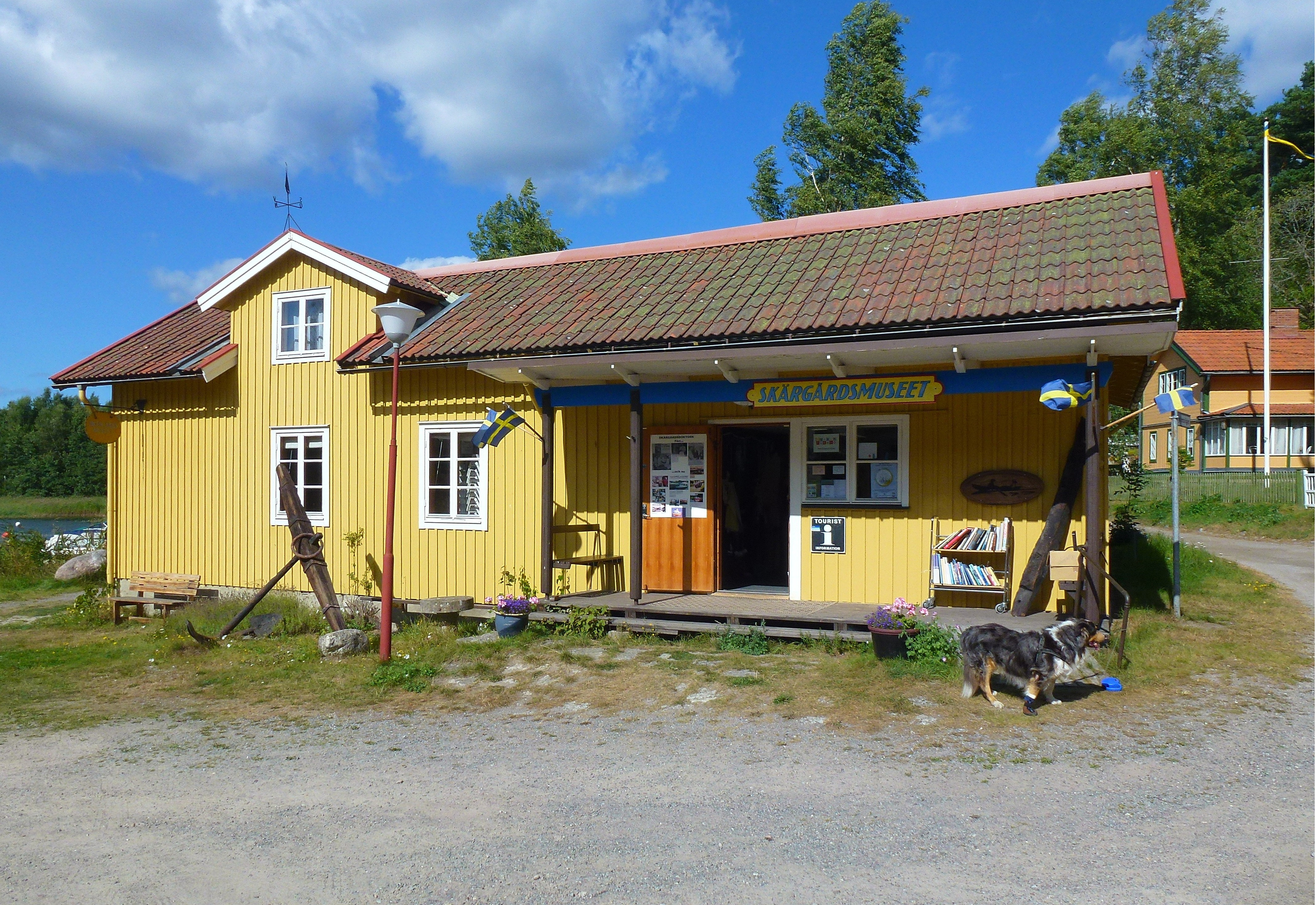 Stavsnäs Skärgårdsmuseum